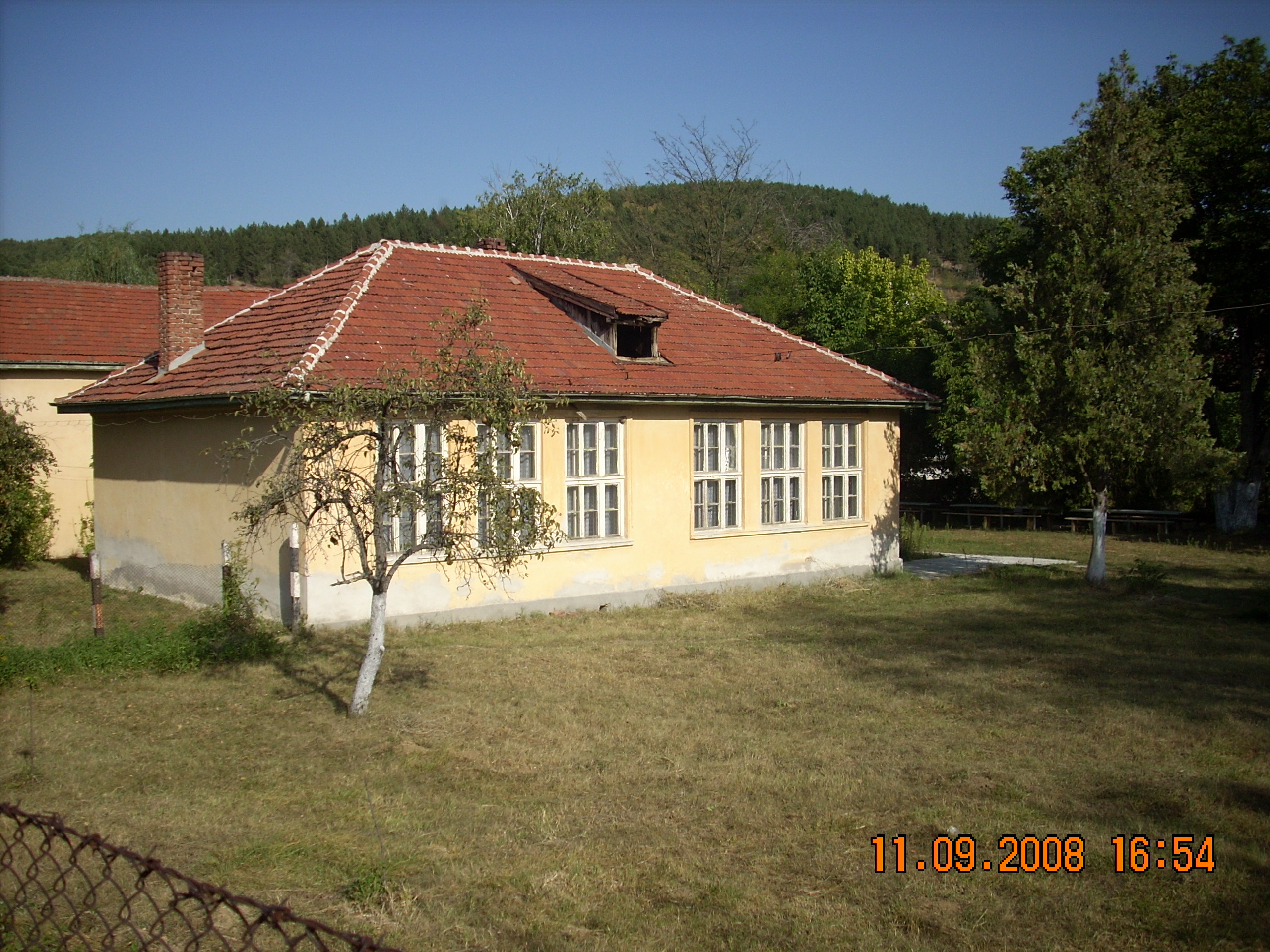 Сградата на бившето основно училище в малкото село Неделкова Гращица. Намира се зад сградата на читалището и кметството. През последните няколко години се използва за общоселски събирания и празненства.